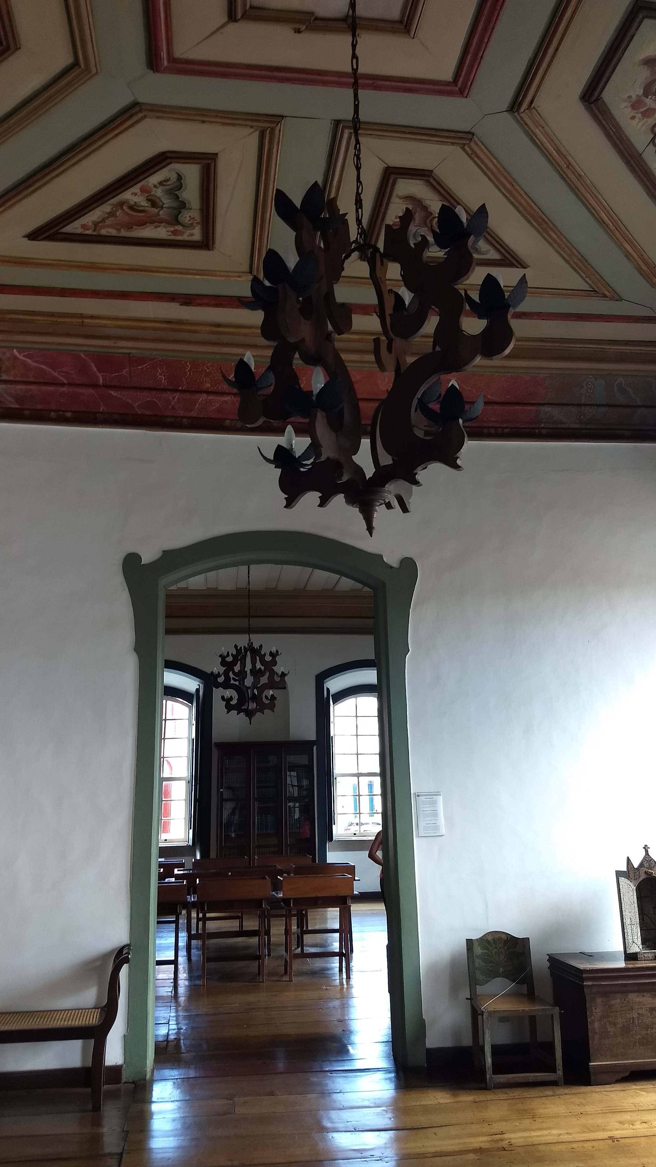 Foto da Casa dos Contos, museu localizado em Ouro Preto, Minas Gerais, cujo objetivo é preservar a história do Ciclo do Ouro e também promover a cultura nacional. Cultural property Casa dos Contos, Ouro Preto, Minas Gerais, Brazil Q10333435, VIAF ID: 200198346, P727: iPatrimônio ID: ouro-preto-casa-dos-contos, HPIP ID: 811